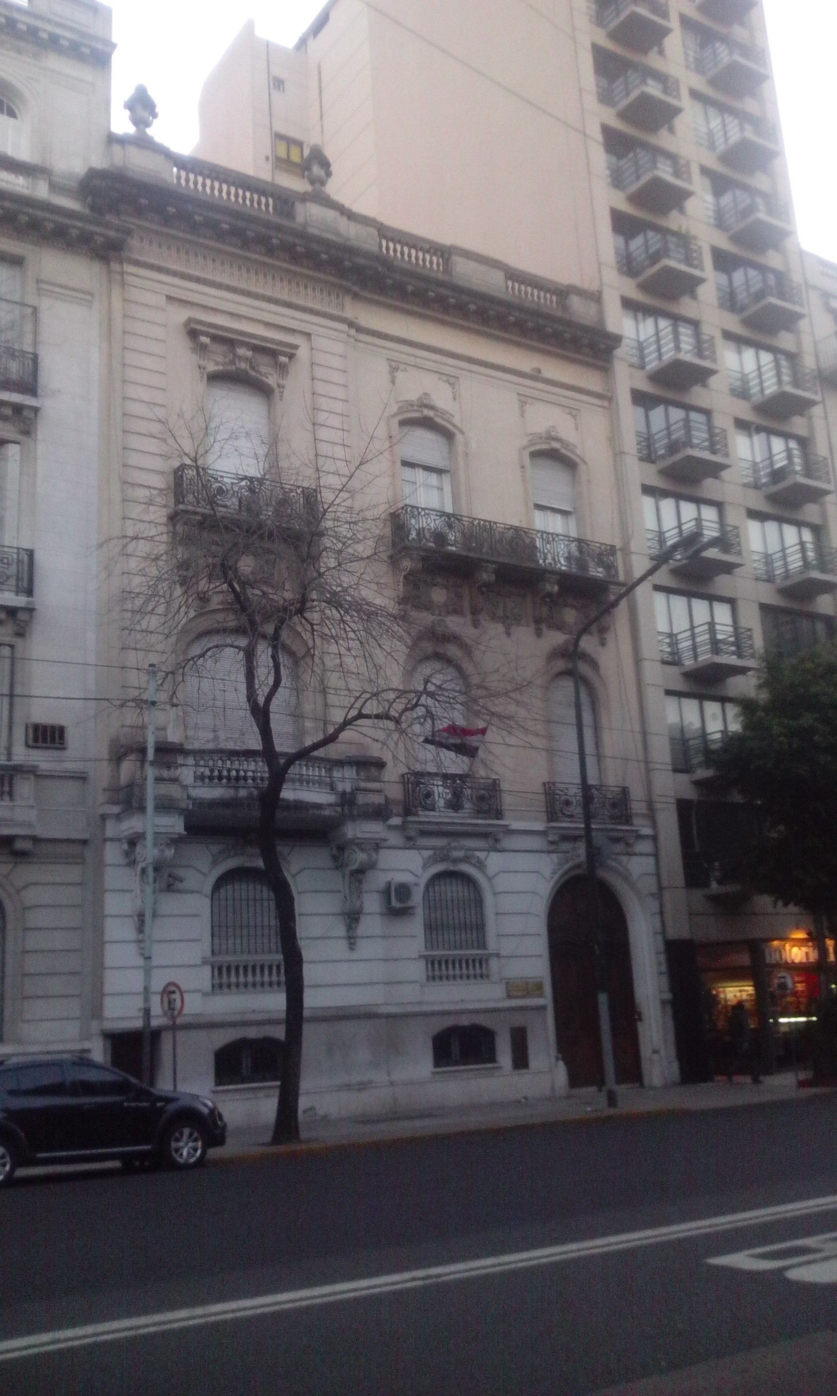 Embajada de Siria en Argentina